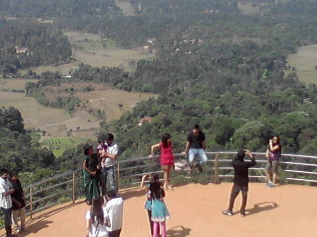 a valley view from rajaseat